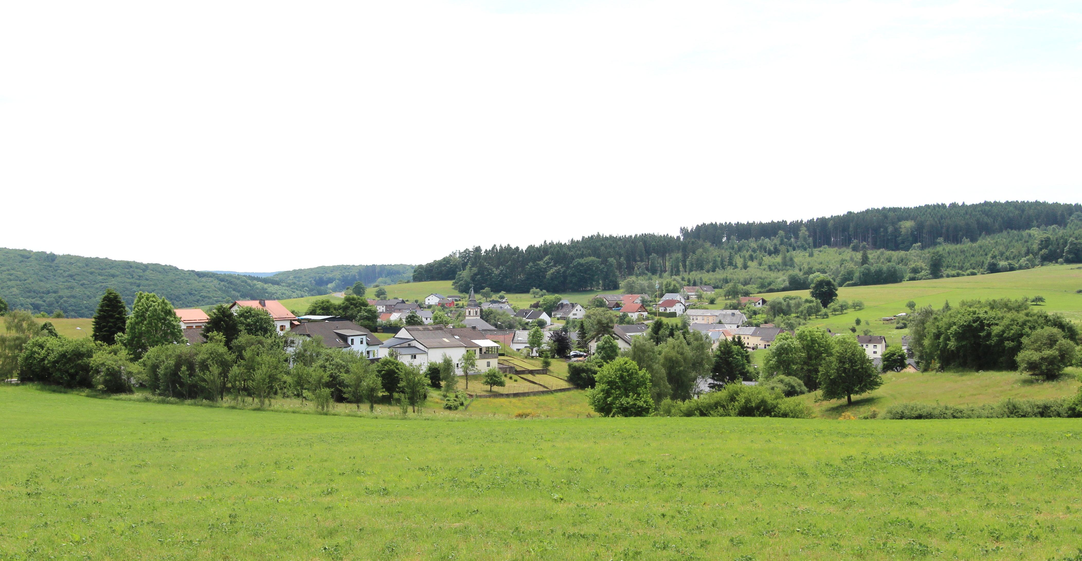 54597 Duppach, nördlich von Duppach. Aufnahme von 2017.